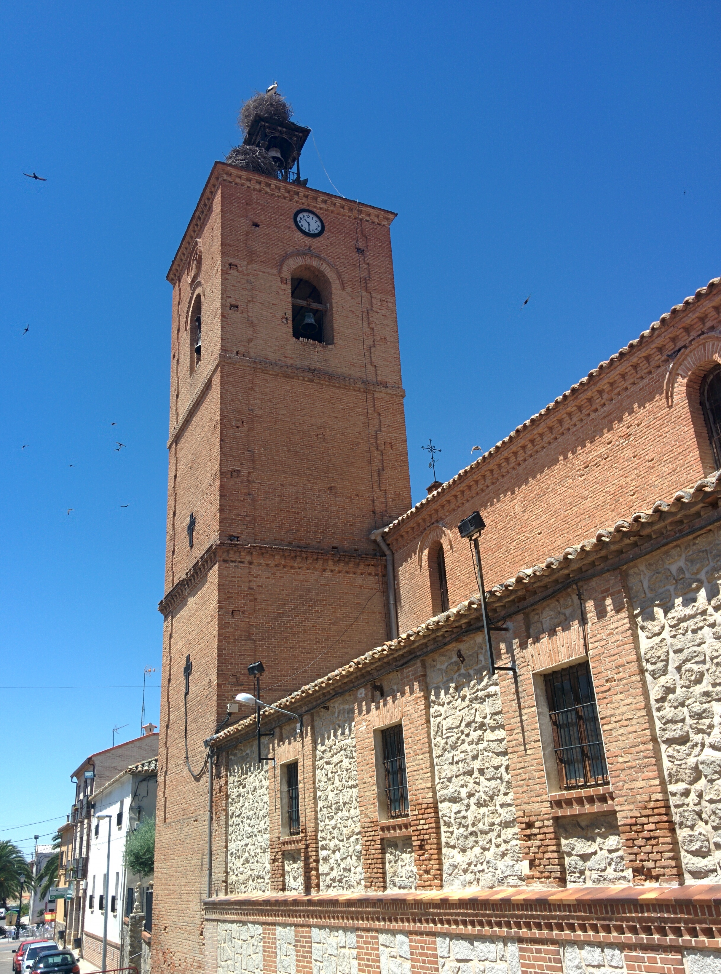 Iglesia de Nuestra Señora de la Asunción, en Pantoja (Toledo, España).